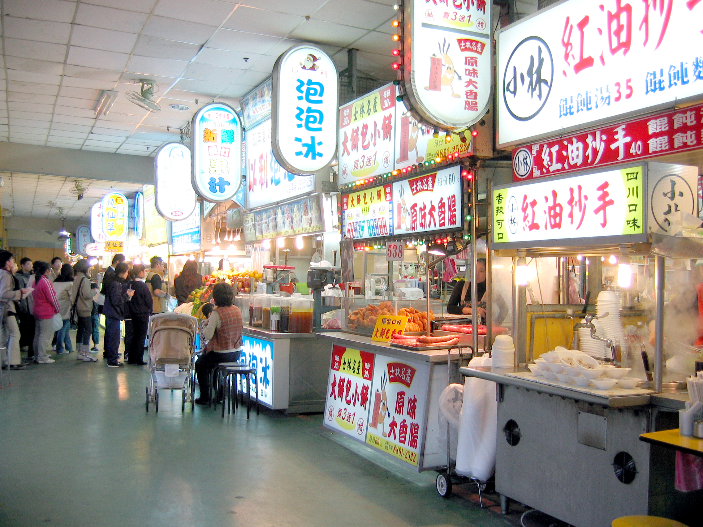 士林臨時夜市內攤商 Richy 09:08 2005年1月30日 (UTC)